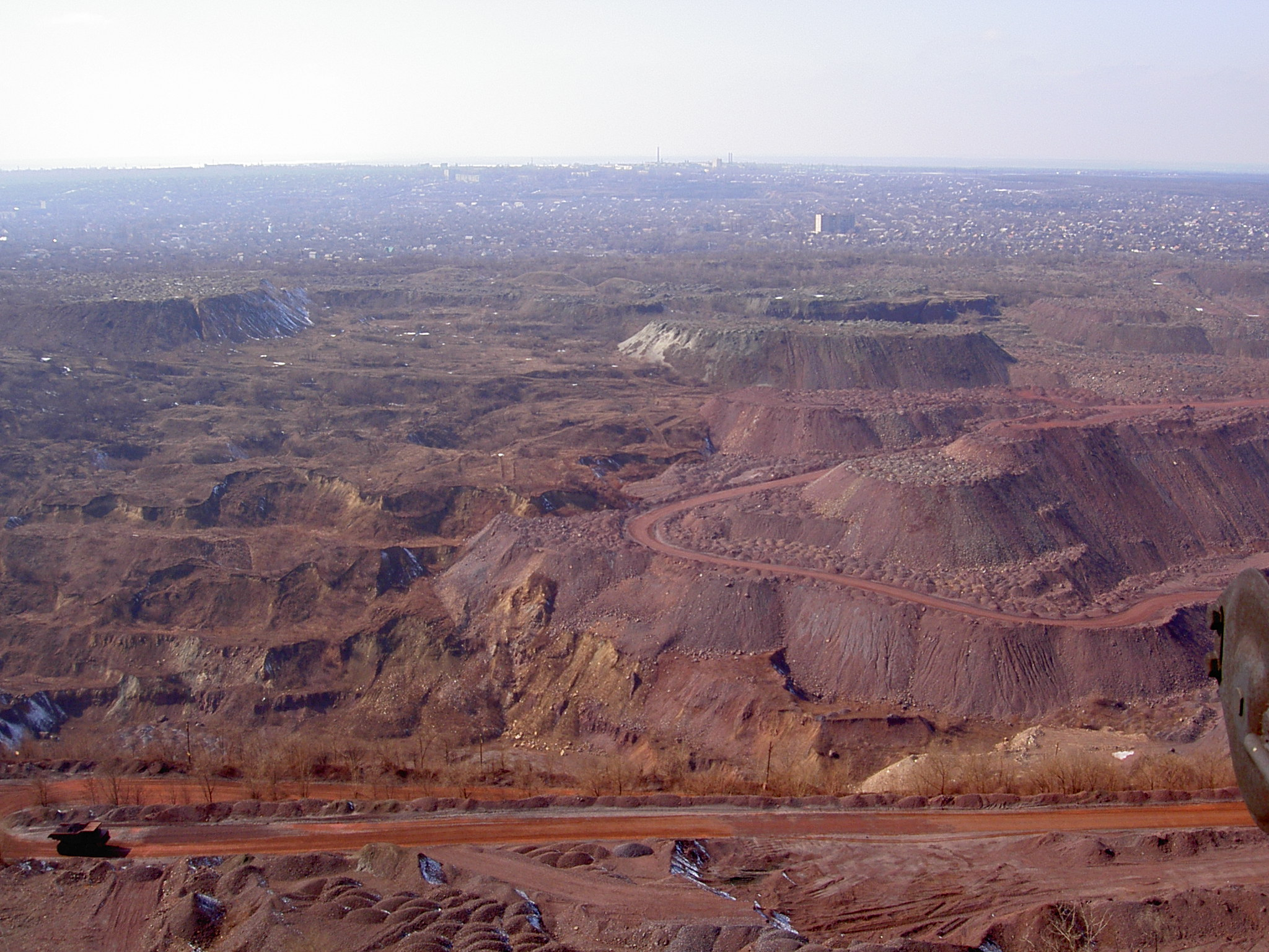 Вид с копра шахты "Гигант" на отвалы карьера "Северный" (запад). Вдали - Карнаватка